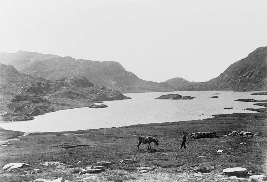 Imatge